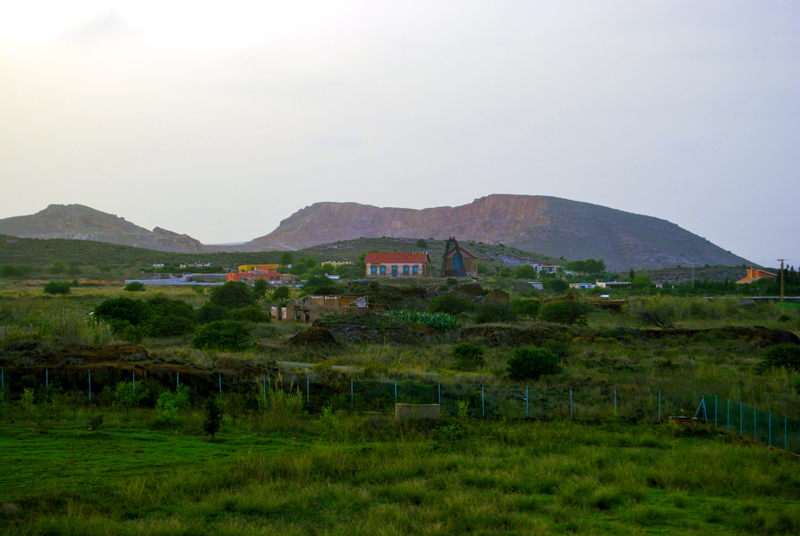 Paisaje minero, mina Las Matildes, Llano del Beal.